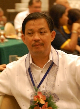 Filipino: Noel Rosal Alkalde ng Lungsod ng Legzapi Albay